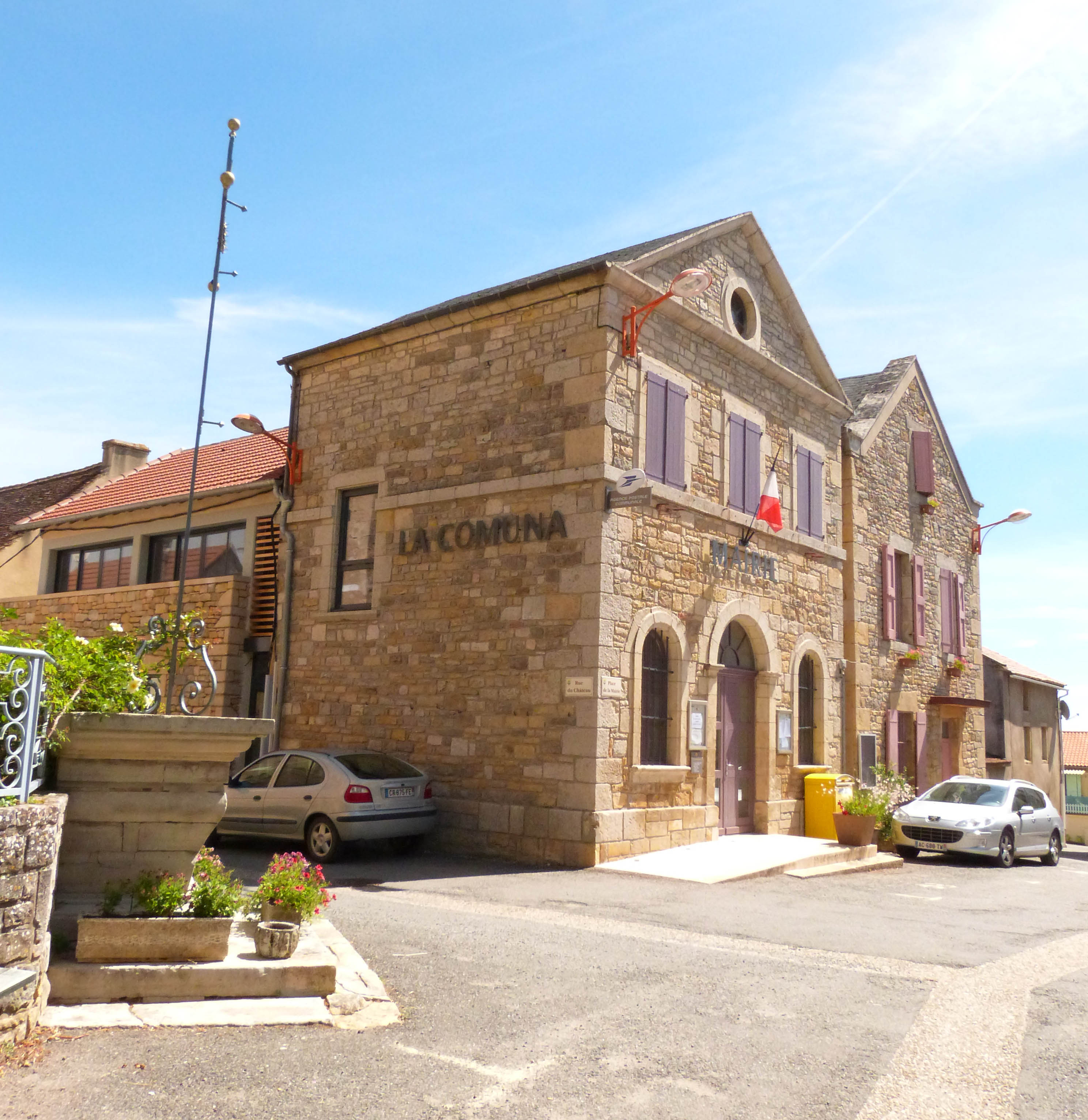 Mairie de Puylagarde